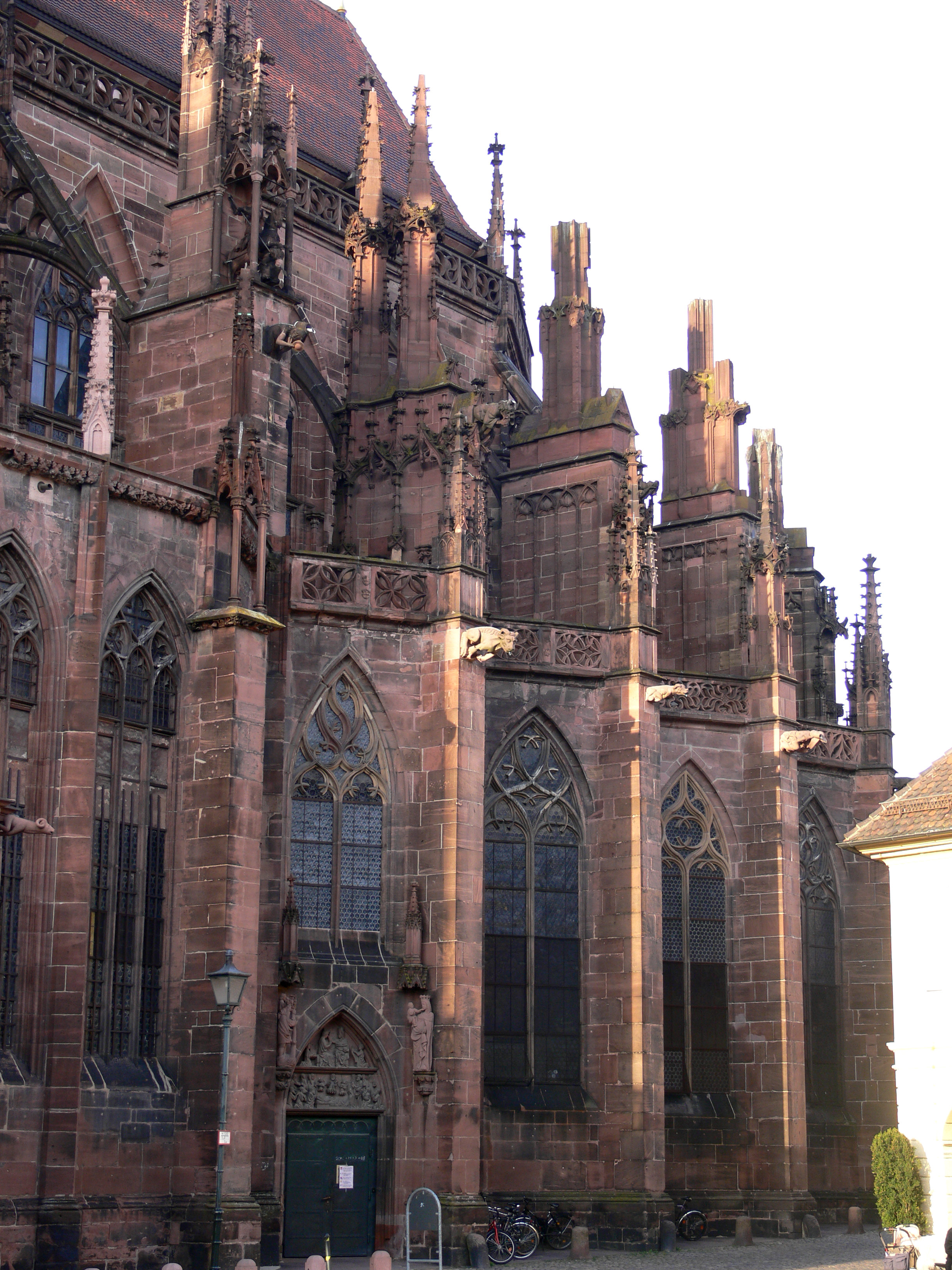 Strebewerk des Freiburger Münsters, Freiburg im Breisgau